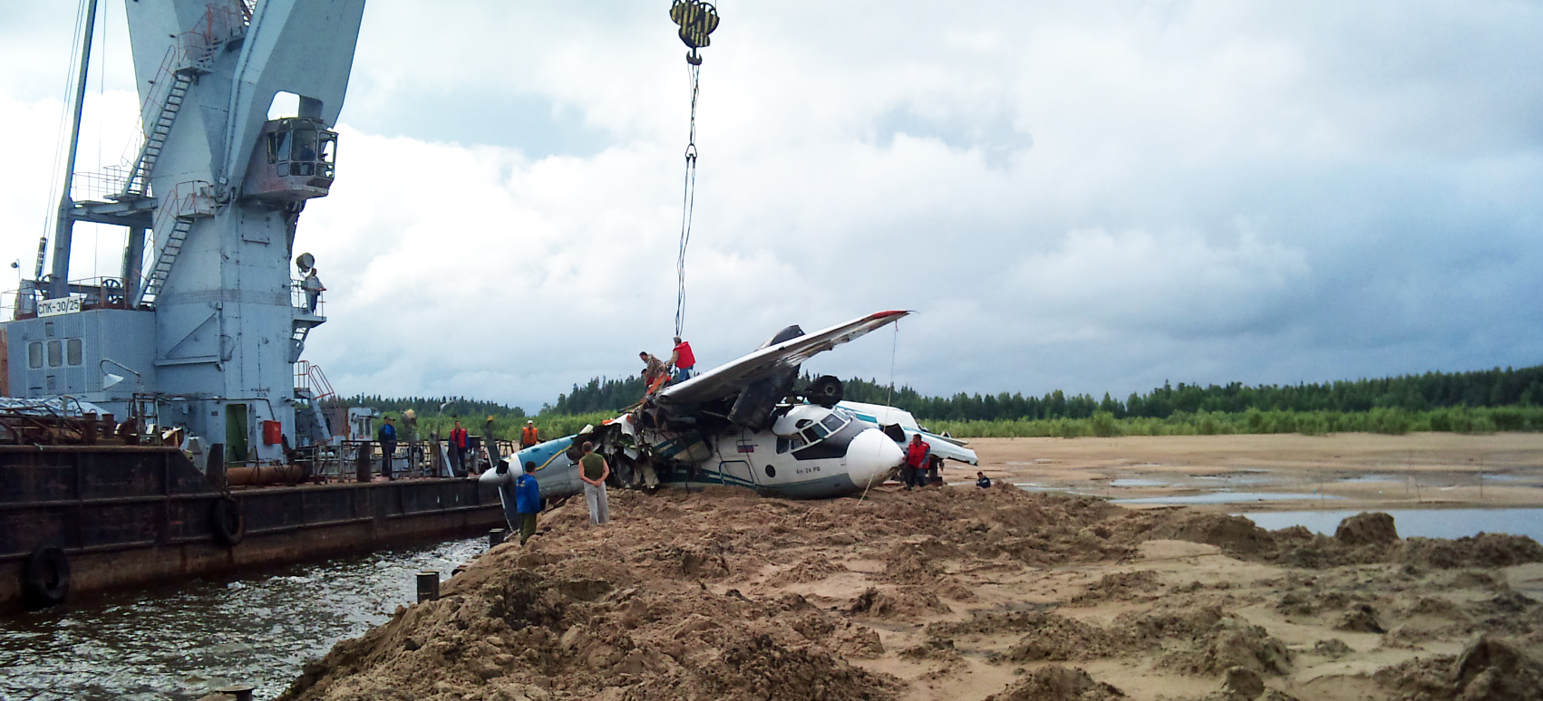 АН-24 После жесткой посадки, погрузка АН-24